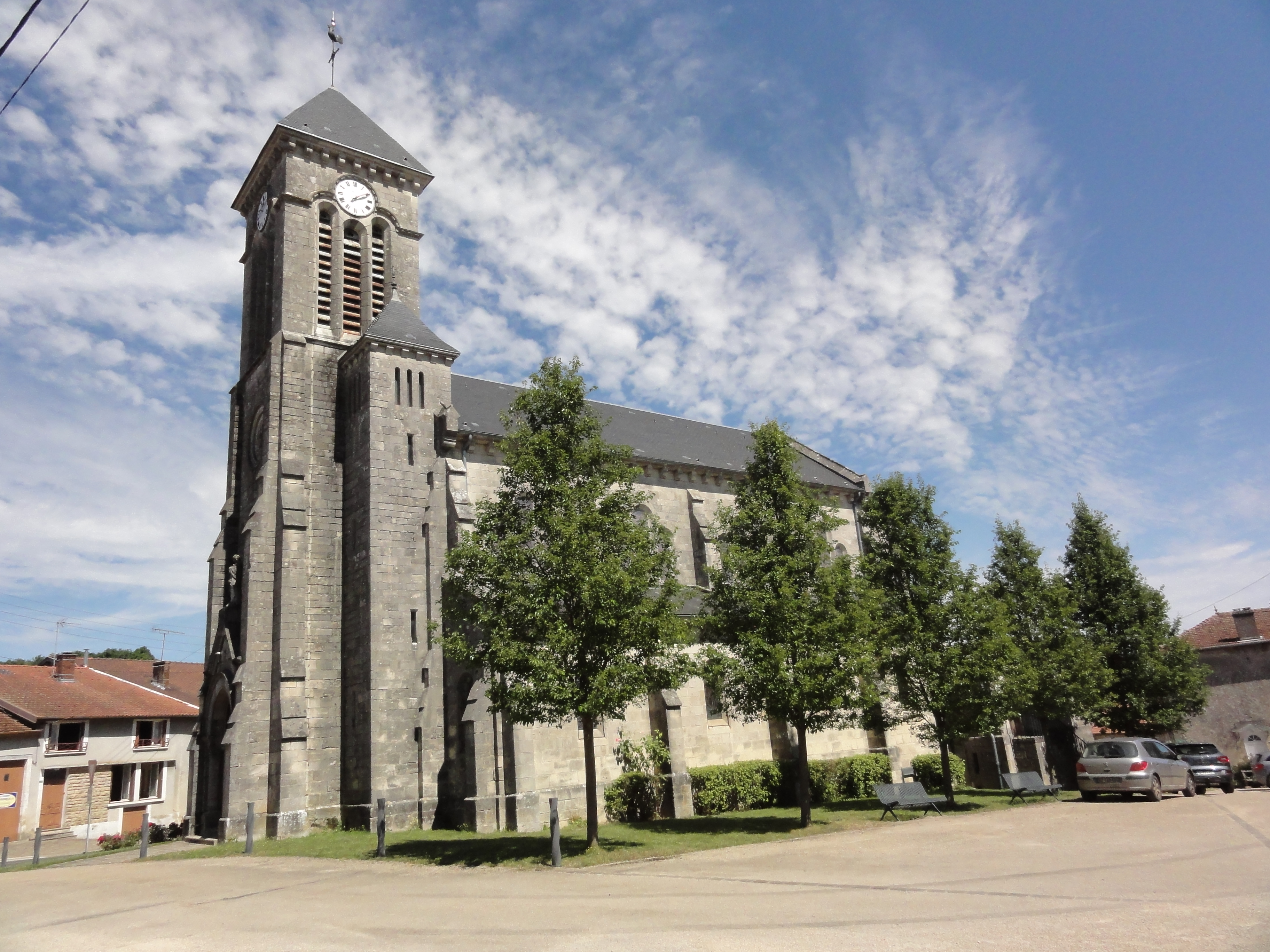 Juvigny-en-Perthois (Meuse) église